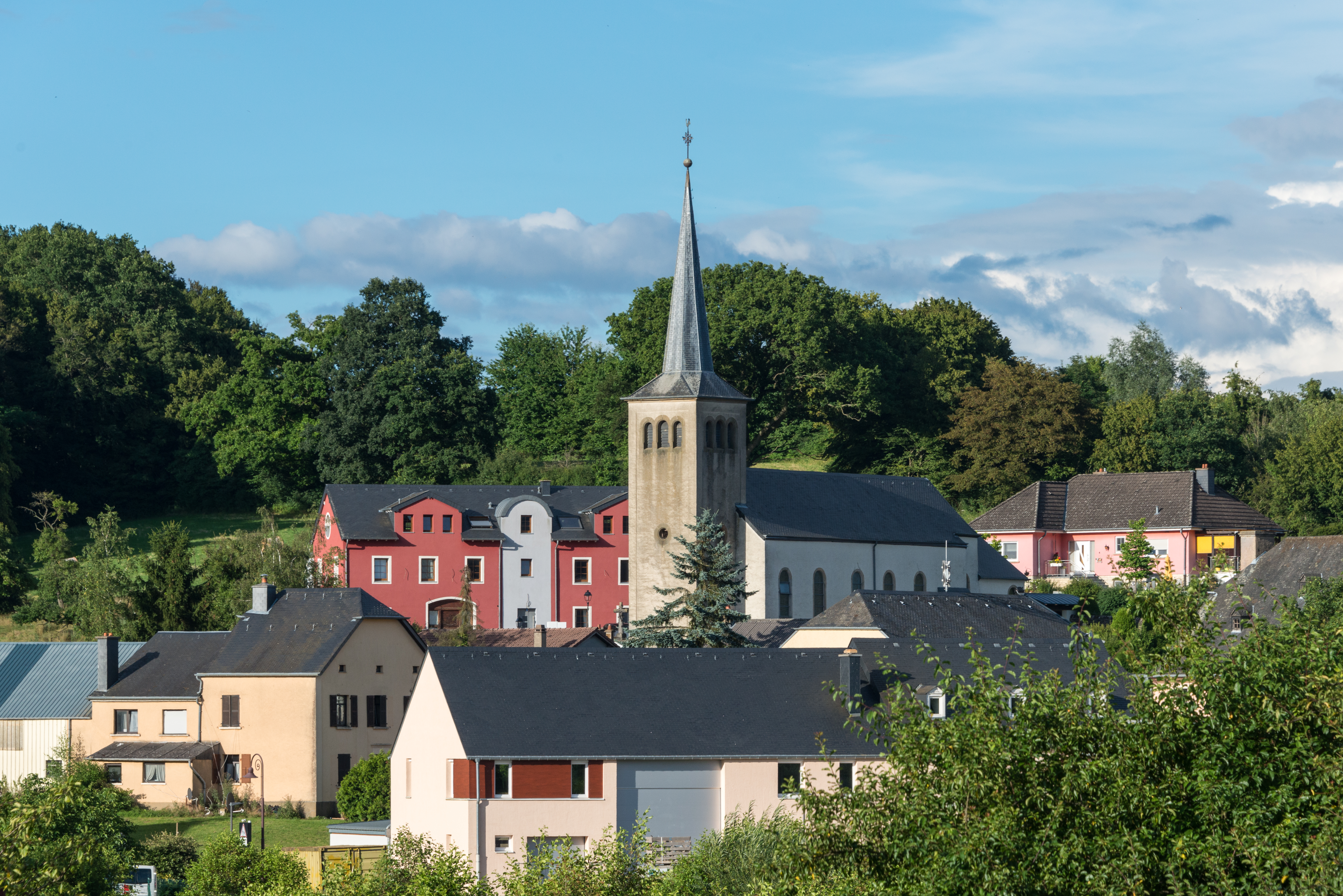 Vue op Bëschdref.